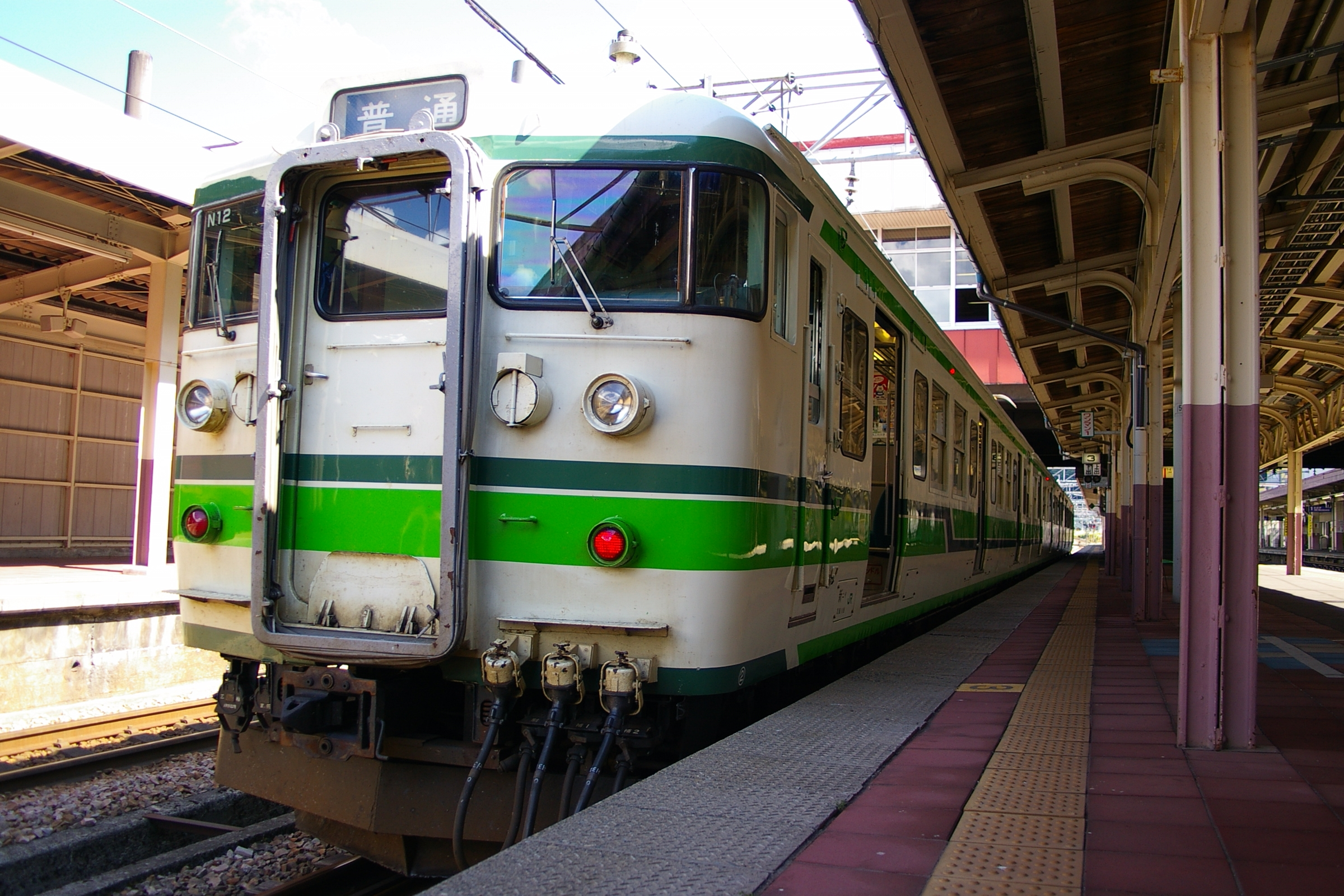 115系新潟色（越後湯沢駅にて）